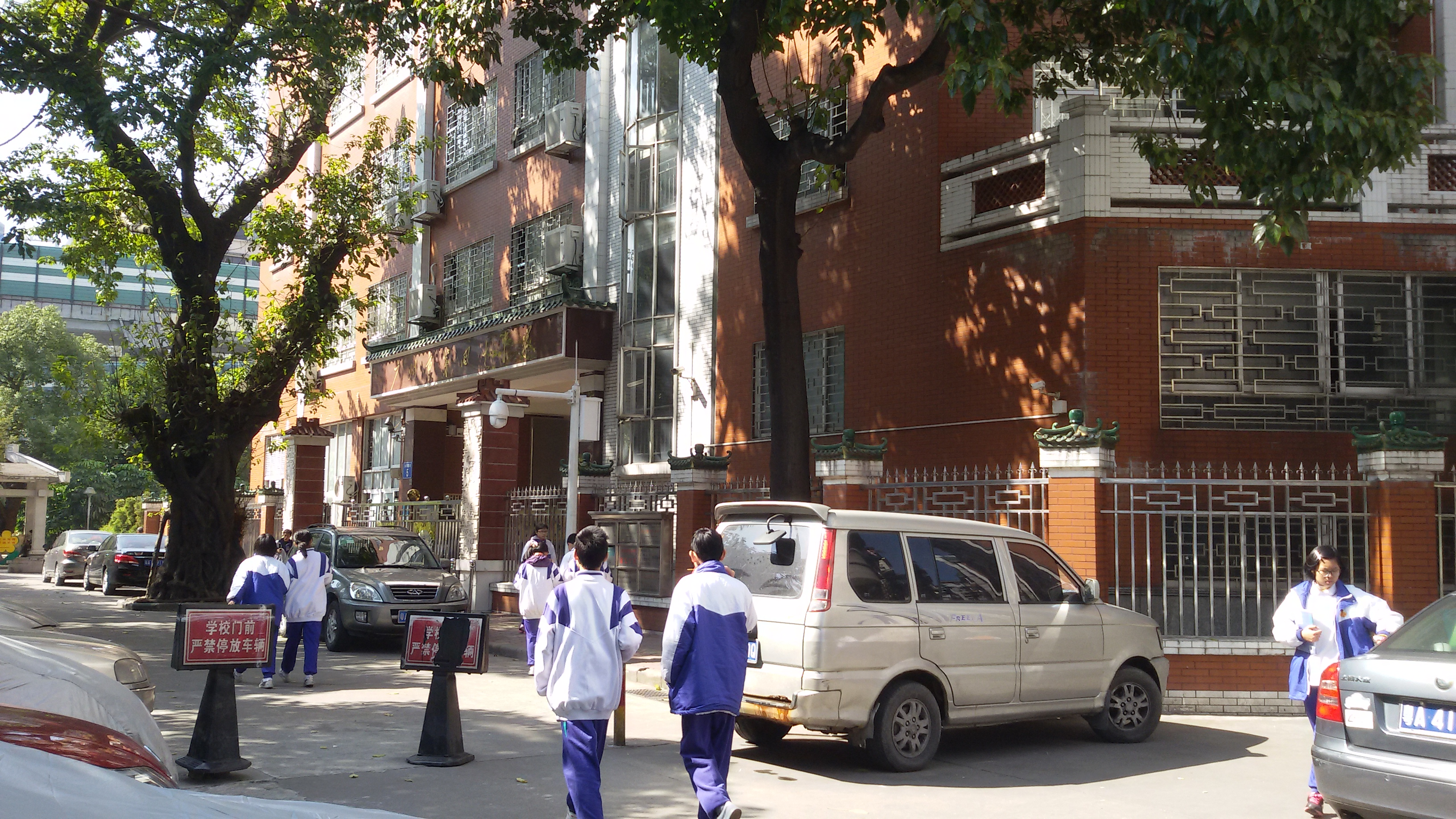 粵語: 广州市第卌中学嘅正门